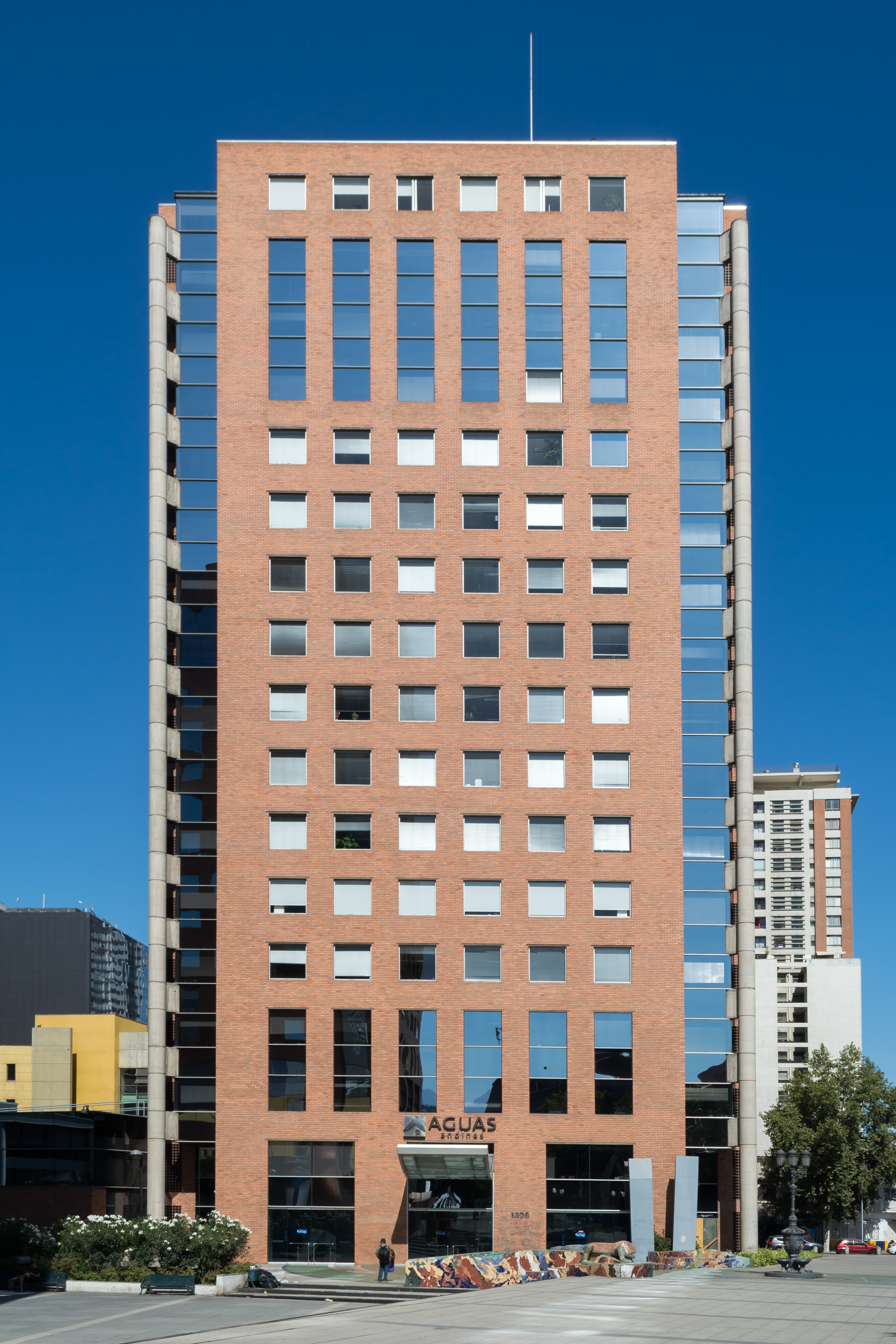 Edificio Aguas Andinas, Santiago, Región Metropolitana, Chile